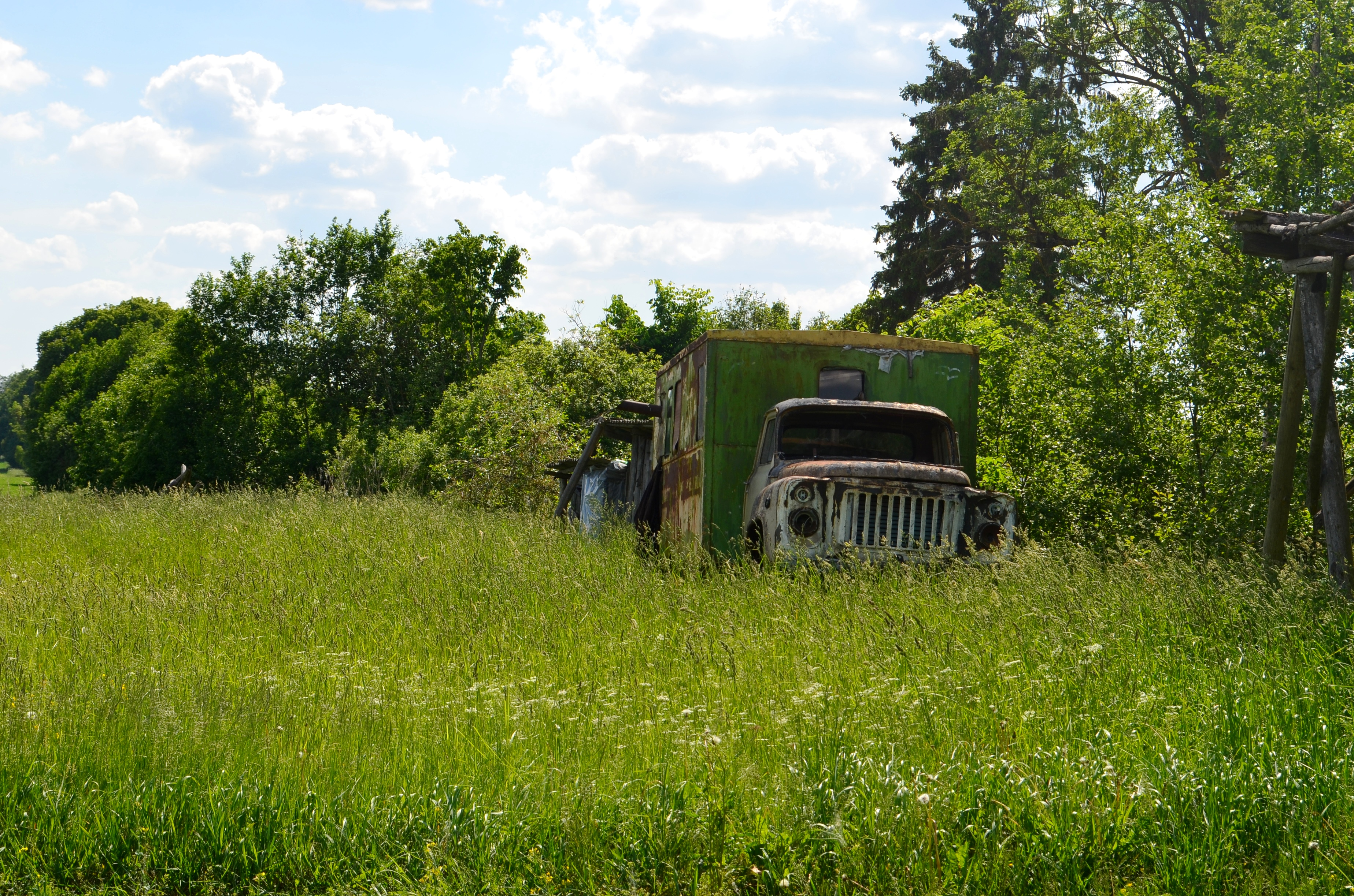 Sunykęs GAZ-53, Šarūnai, Joniškio raj.